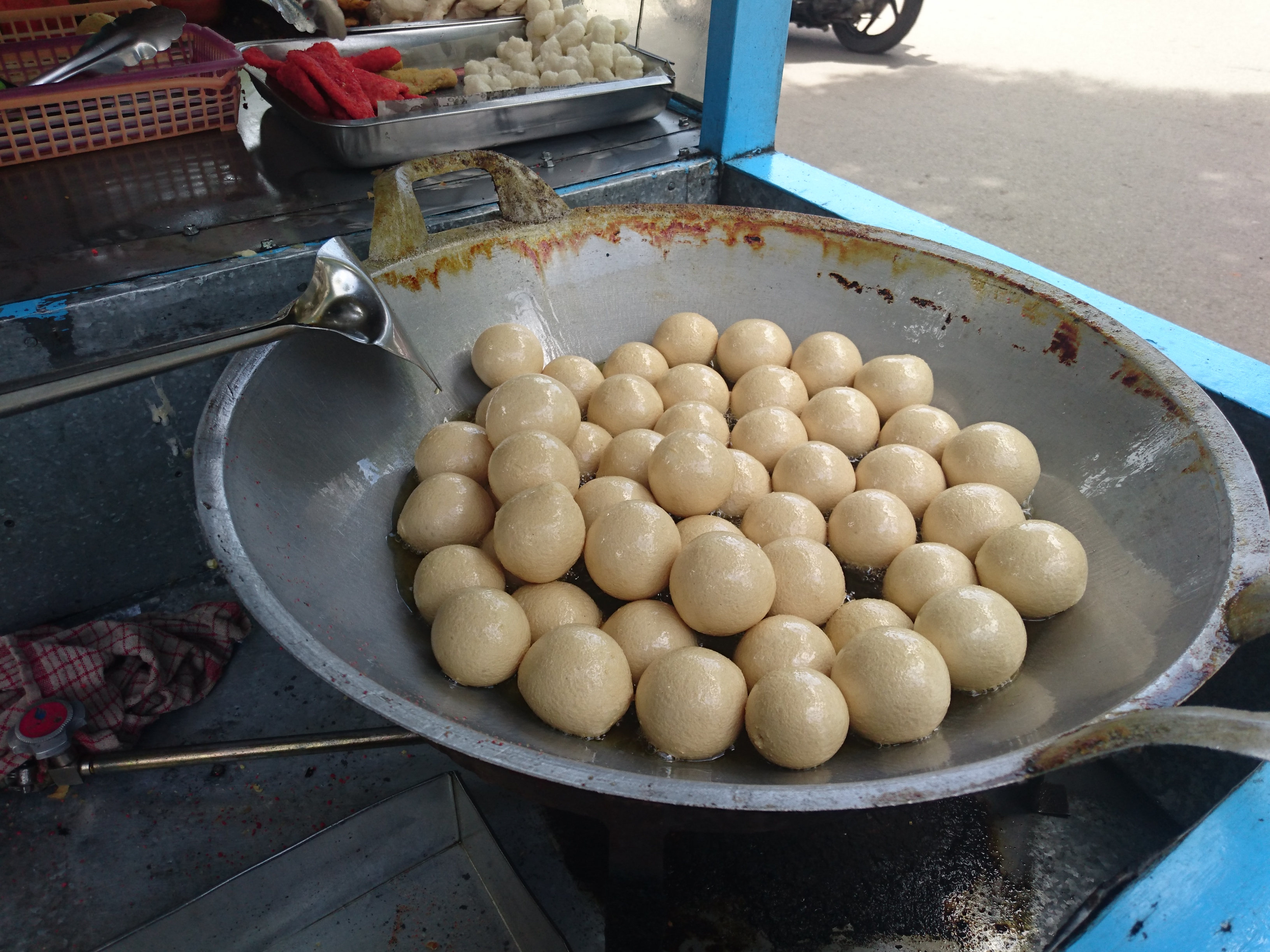 Makanan ini adalah makanan yang biasa ditemukan di pinggir jalan. Tahu bulat dibuat berbeda dari tahu biasa yang berbentuk kotak dan berisi. Karena bentuknya yang menarik dan terasa ringan, tahu bulat menjadi jalanan favorit di Indonesia.